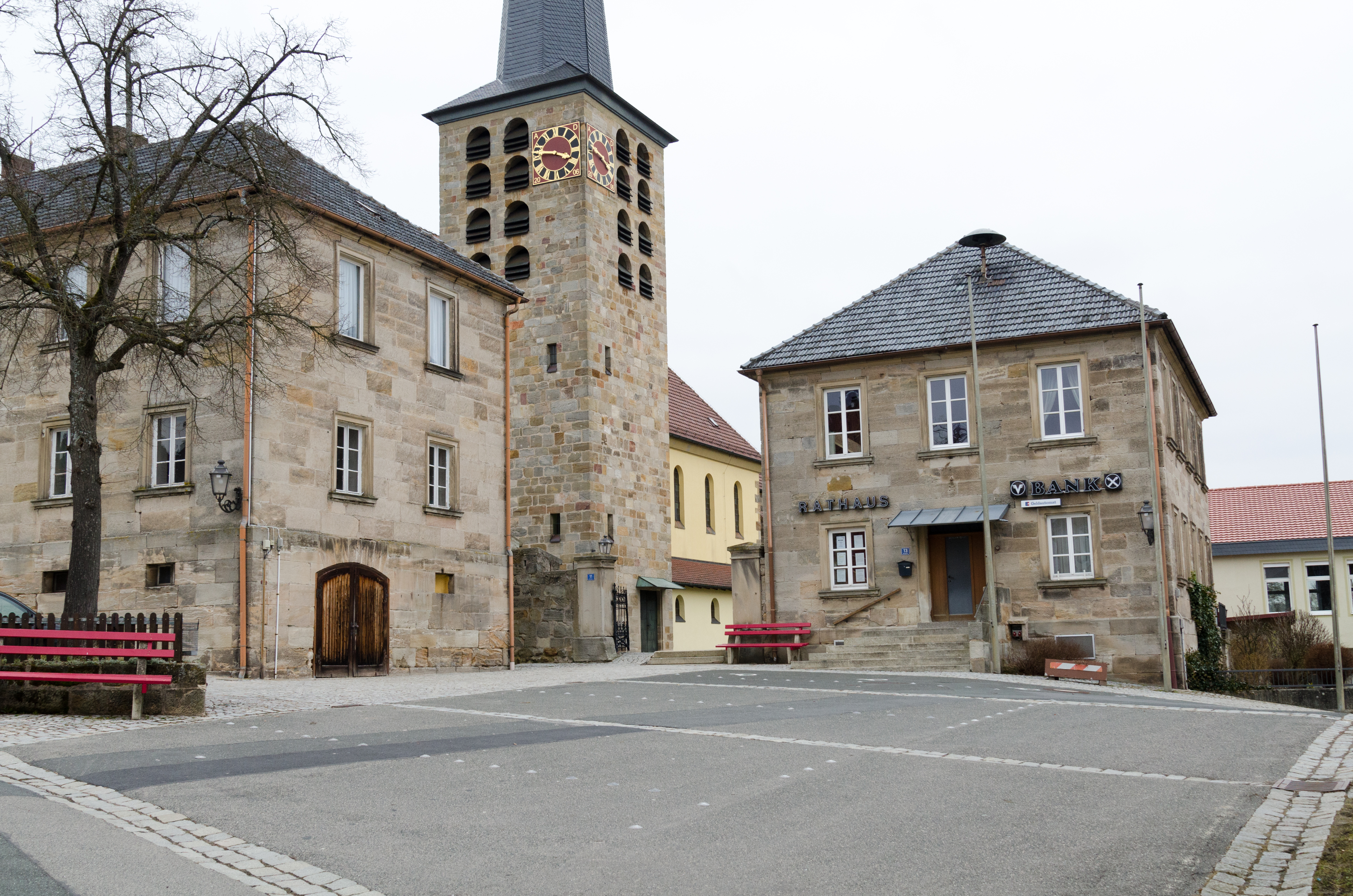 Marktgraitz, Marktplatz 9, 13